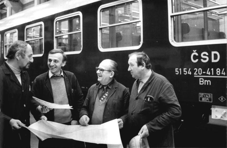 Bautzen, tschechische Gastarbeiter ADN-ZB Häßler 13.1.84 Bez. Dresden: Am 3 500. Reisezugwagen für die Tschechoslowakische Staatsbahn (CSD) arbeiten gegenwärtig die Montagekollektive im VEB Waggonbau Bautzen. Spezialisten aus der CSSR, hier Vladimir Onderka (2.v.l.) und Ivo Sunek (2.v.r.) von CSD im Gespräch mit den TKO-Mitarbeitern Walter Klose (l) und Volker Salokat, pflegen die enge Kooperation mit den Schienenfahrzeugproduzenten. Als erstes Exportgut des Bautzener Betriebes wurde 1957 ein Gepäckwagen an die CSSR geliefrt, die seitdem zu den Hauptkunden des VEb Waggonbau Bautzen gehört. siehe auch 1984-0113-4 u. 5N